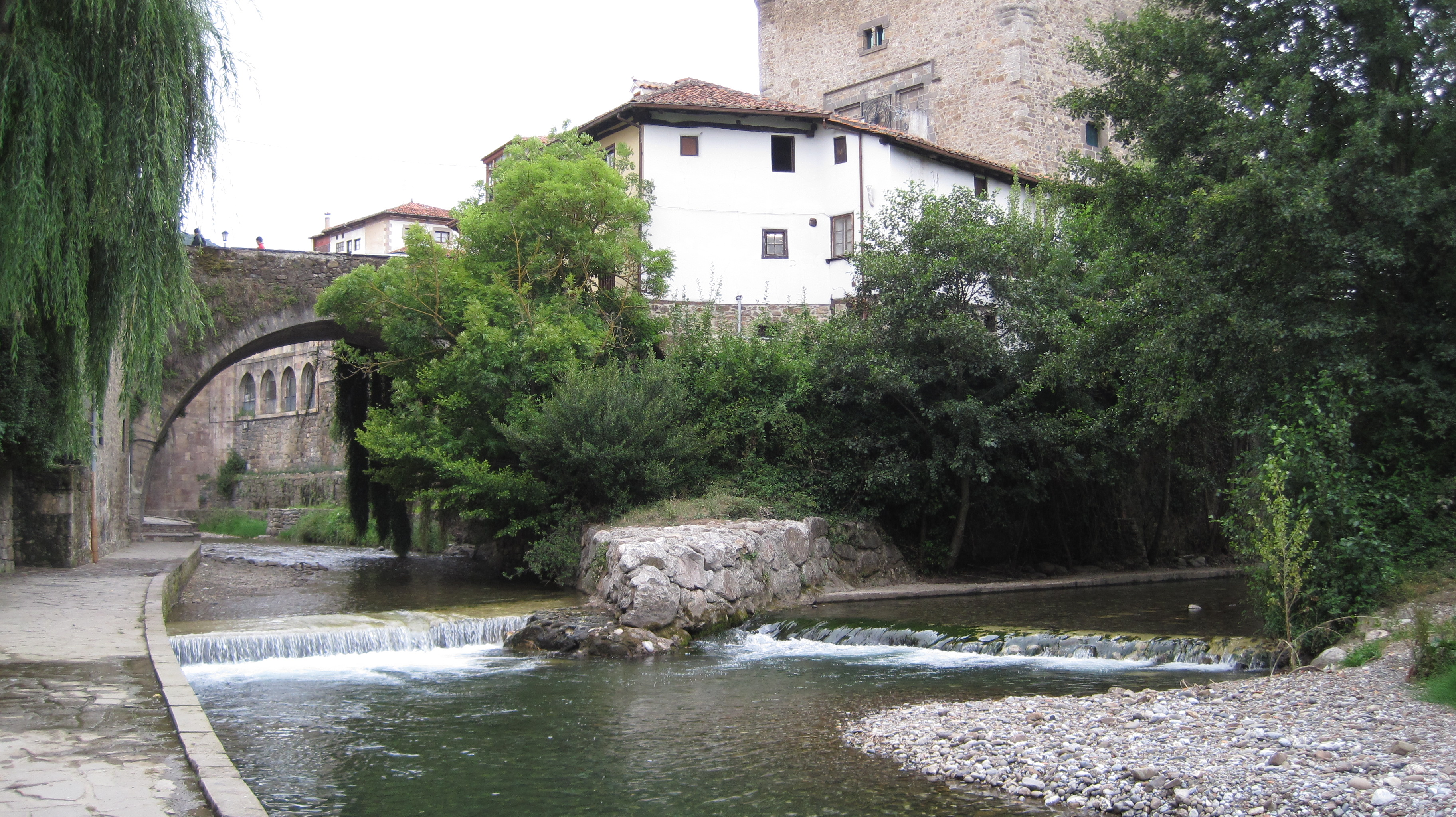 Desembocadura del río Quiviesa en el río Deva, en Potes (Cantabria, España).